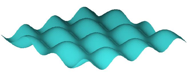 Priklad interference rovinnych vln